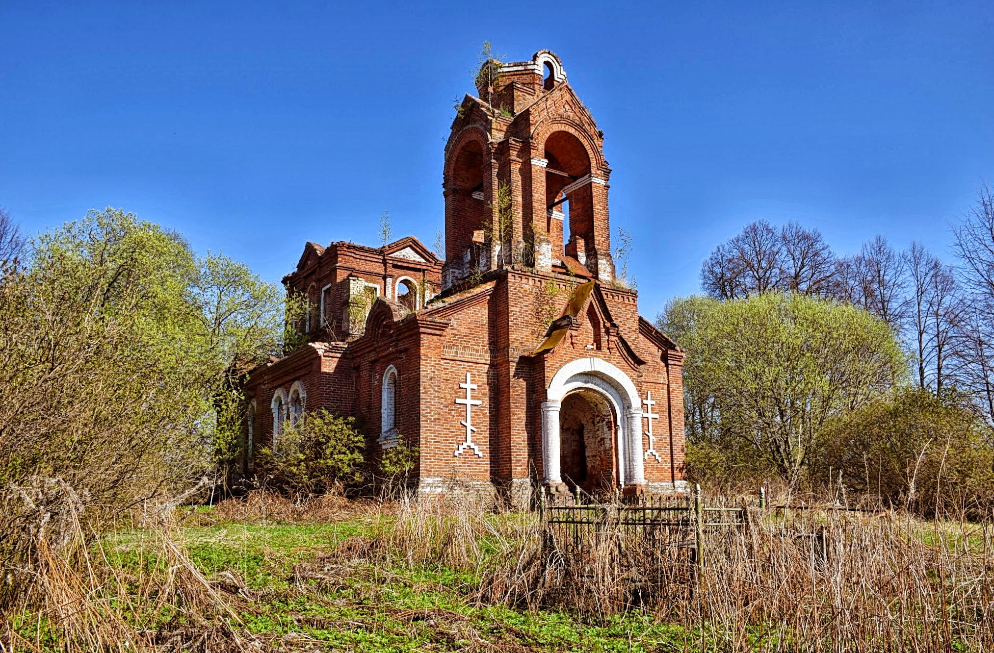 Вознесенская церковь (Одигитриевская): Ректы, Дорогобужский район, Смоленская область